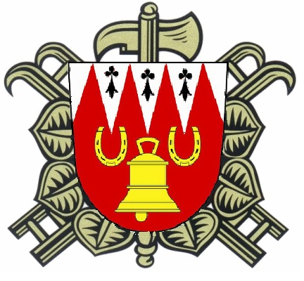 znak SDH Jezbořice